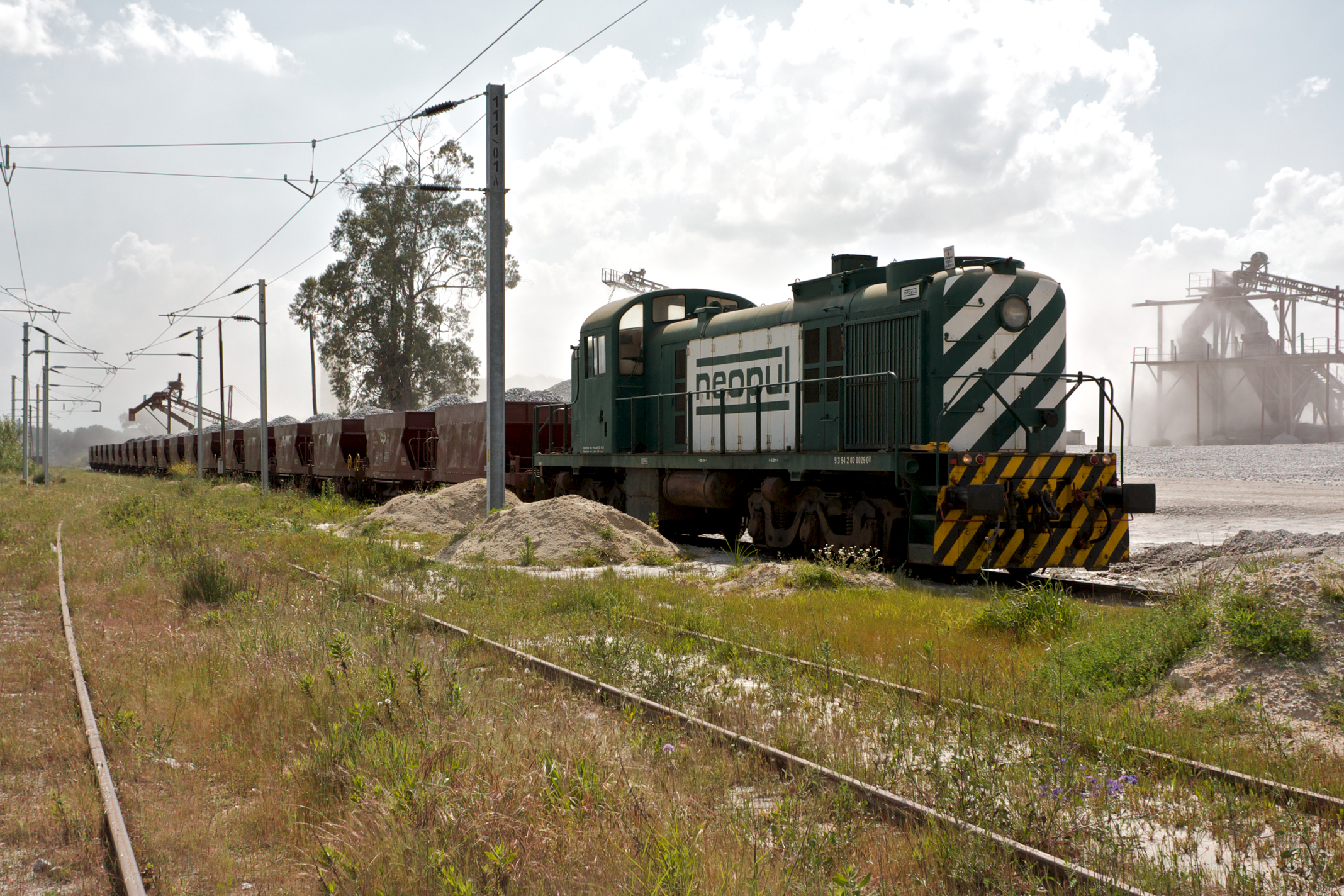 a carregar balastro durante as obras na Linha do Alentejo. Local: Estação de Monte das Flores [Linha de Évora, PK 111] Data e hora: 26 de Abril de 2011 [16h09] Material: Locomotiva 1502 [Alco] N.º UIC: 93 94 200 0029-0 P